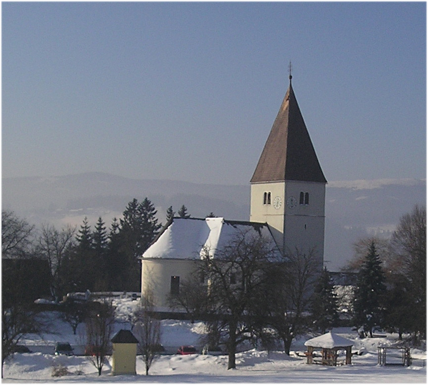 Pfarrkirche von St. Jakob in Freiland. Teil der Aufnahme ""Bild:Freiland bei Deutschlandsberg.JPG"". Bearbeitet am 19.02.2006 von Fklug digital bearbeitet.